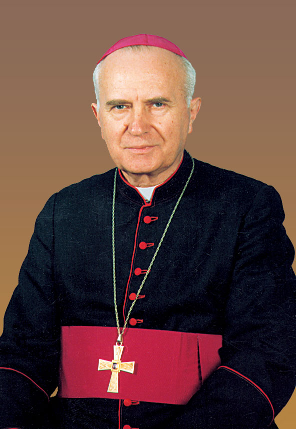 episcop konkoly